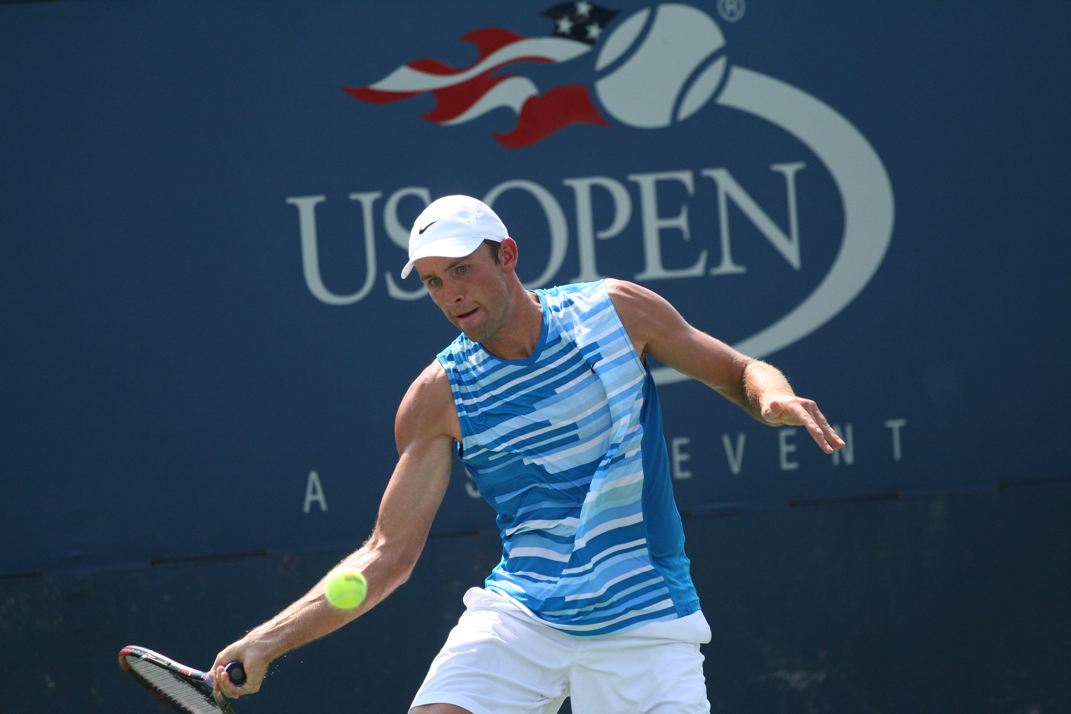 U.S. Open Sept. 1, 2010